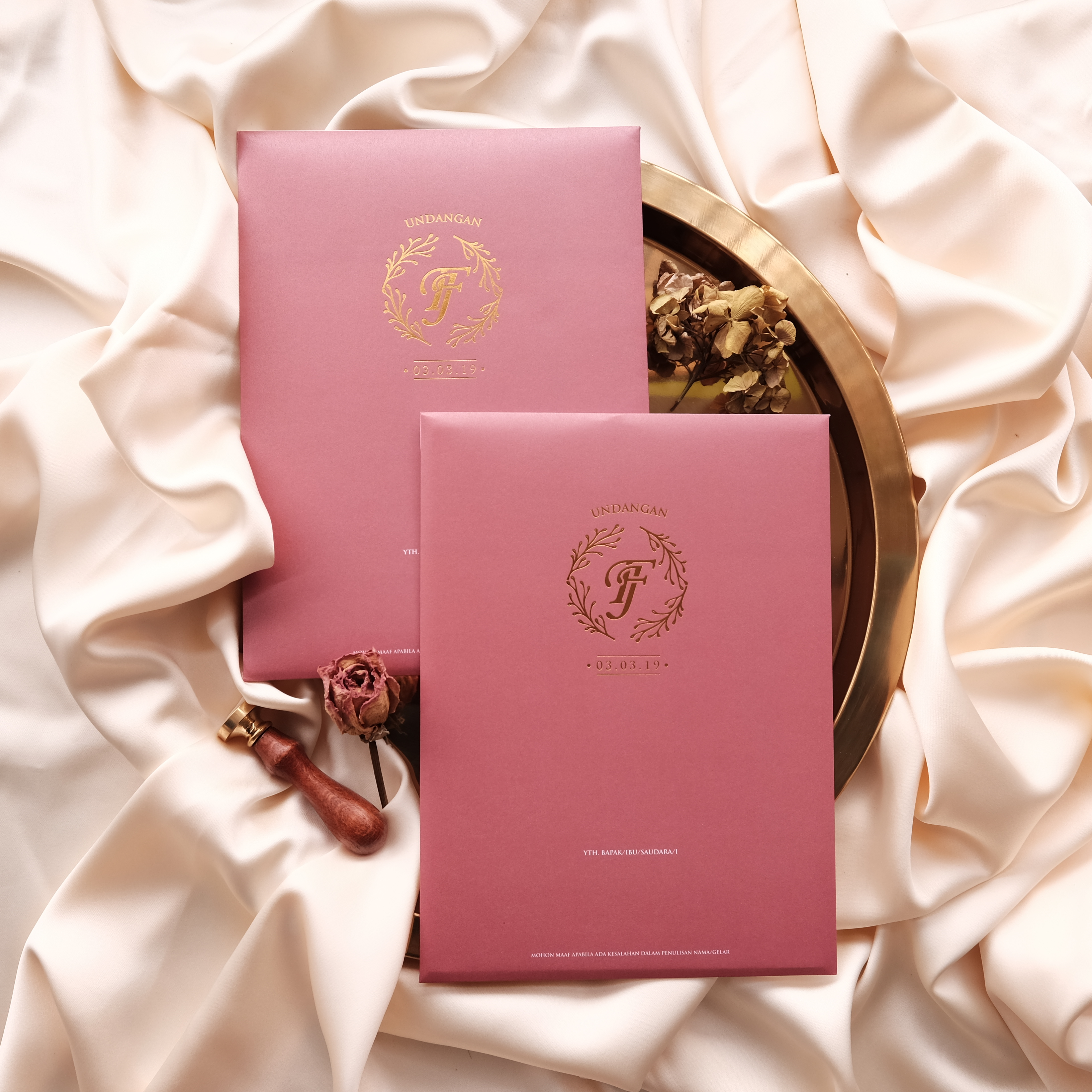 Contoh Undangan Custom